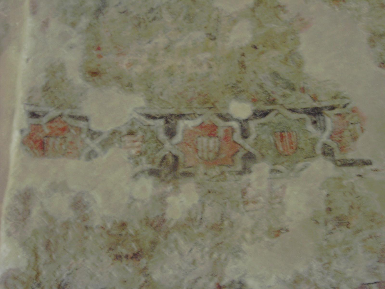 Signum Nostri de tres barras en el interior de la antigua iglesia de Moriello de Sampietro, en la boca del Valle de Vió. El núcleo actualmente está deshabitado y fue adherido al municipio de Boltaña, pero en tiempos no muy lejanos llegó a gozar de cierta popularidad por la calidad del trabajo de algunos de sus artesanos madereros.